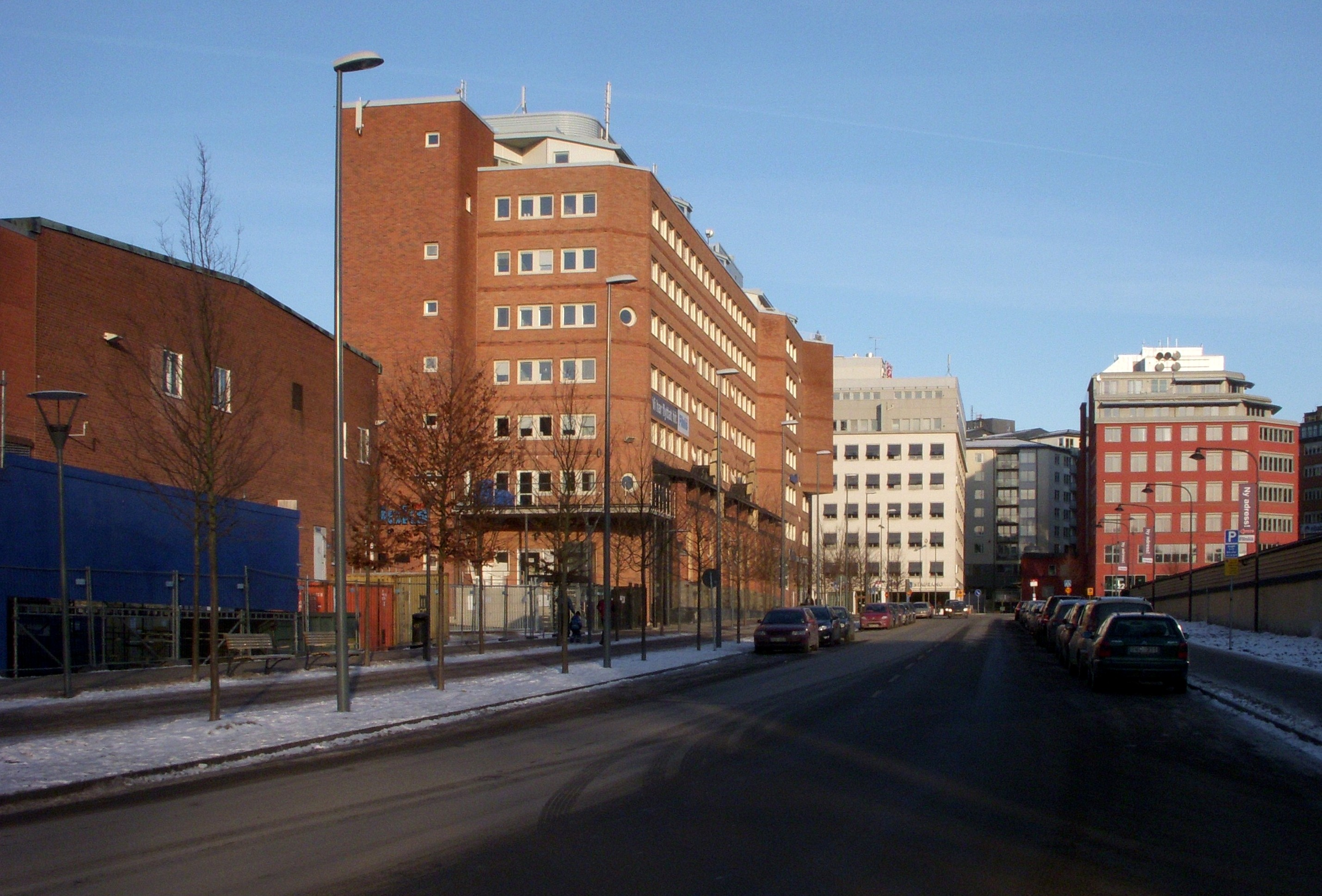 Nordenflychtsvägen norrut i höjd med Hornsbergsdepån